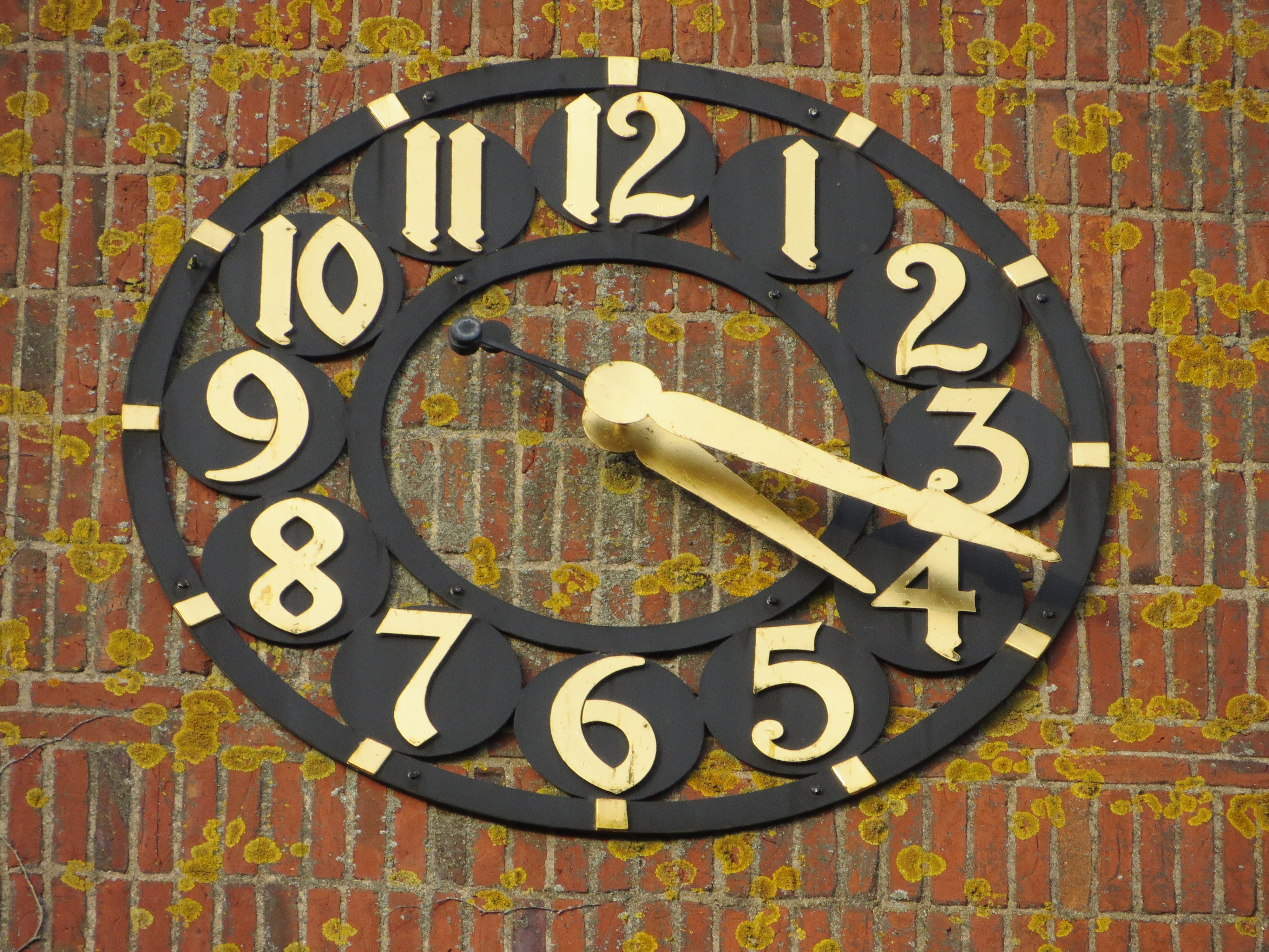 Nordertor-Uhr an der St. Michaelkirche, Südseite des Kirchturms, Bild 02